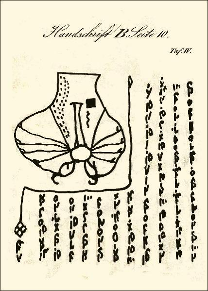 Eine der acht Tafeln mit Faksimiles der Batta-Schrift